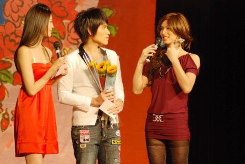 藝人楊宗緯、姚采穎擔任國立臺灣藝術大學廣播電視學系第34屆藝美獎頒獎人。